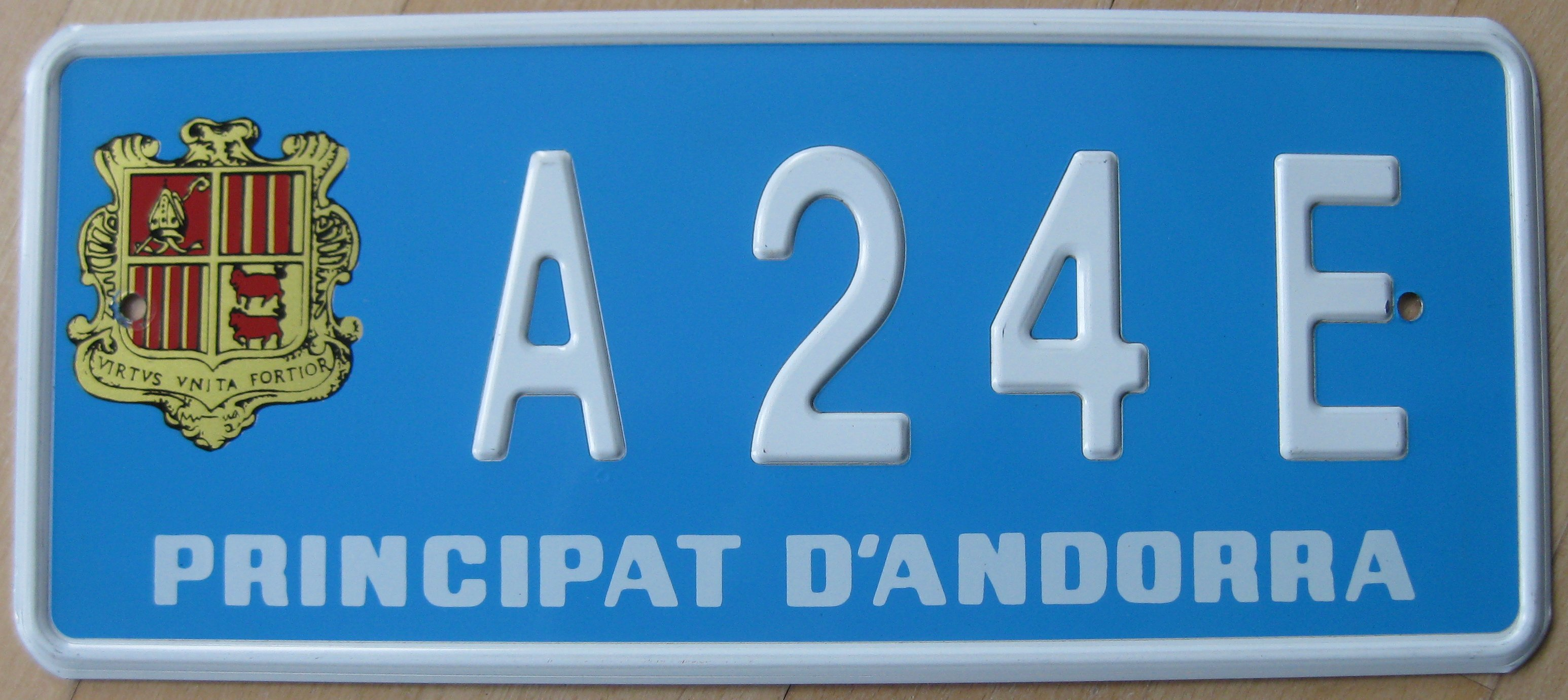 Diplomatenschild aus Andorra